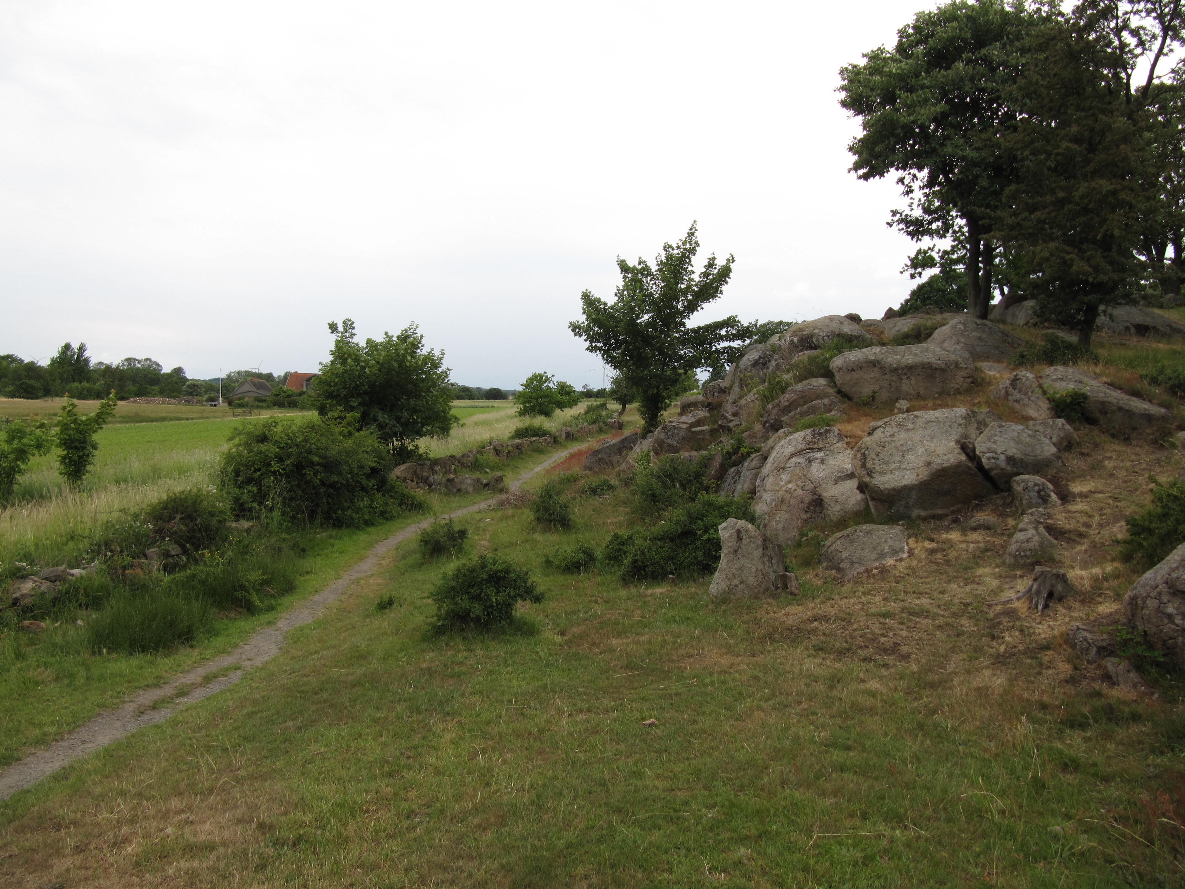 Grænsen mellem højtliggende grundfjeld t.h. og lavereliggende palæozoiske sedimenter t.v.; Klintebakken syd for Aakirkeby set mod vest.